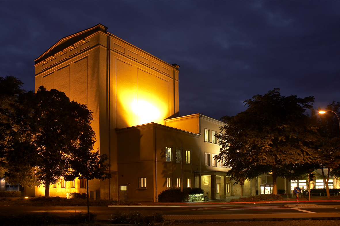 Städtisches Kulturhaus Bitetrfeld-Wolfen